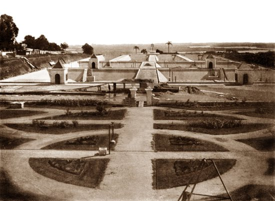 os tanques da Hidráulica Guaibense ainda em construção. O ajardinamento que aparece em primeiro plano existe até hoje em frente à Hidráulica Moinhos de Vento